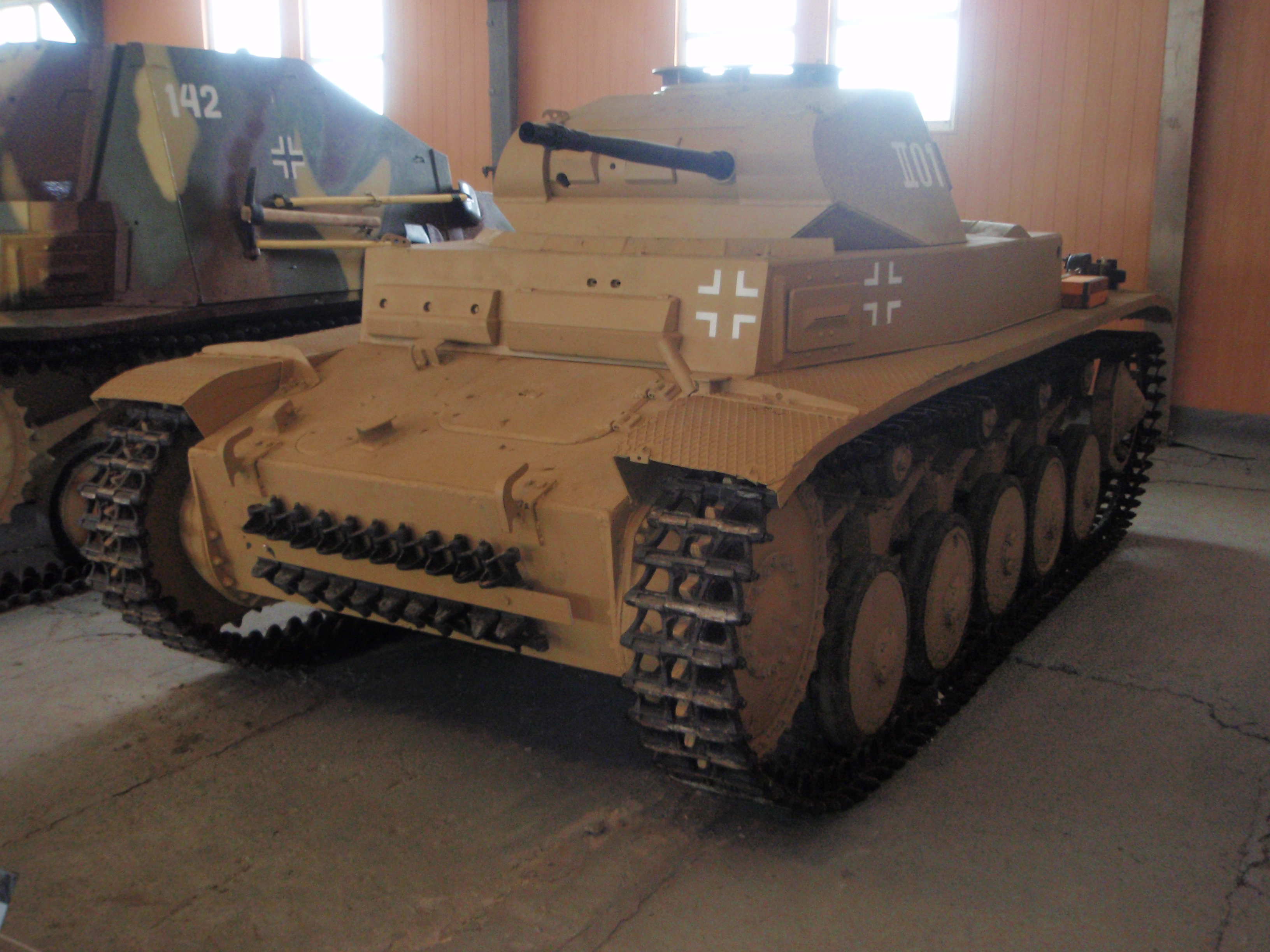 Немецкий лёгкий танк Pz.II в Кубинке